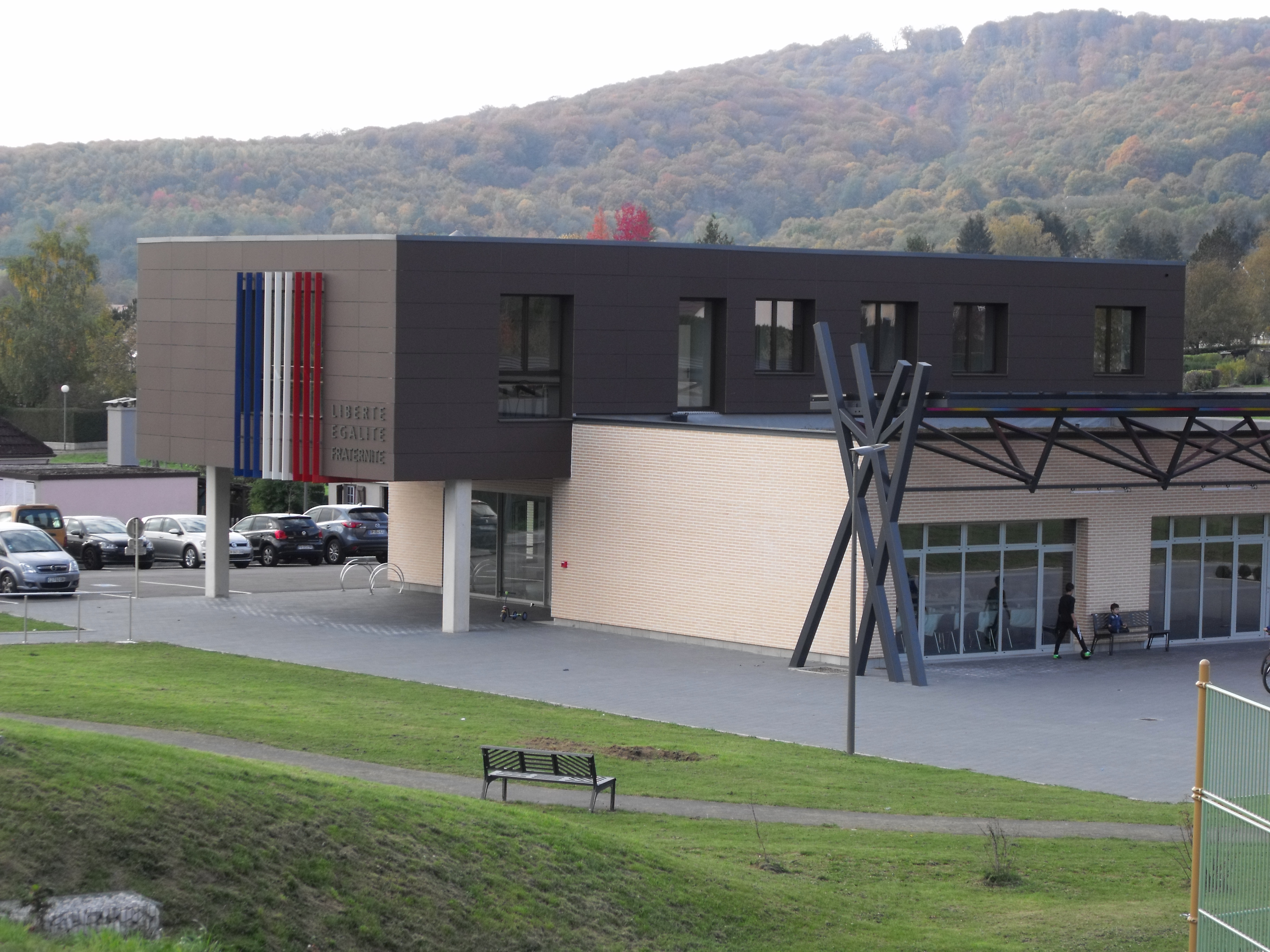 Mairie d'Amagney, Doubs, France